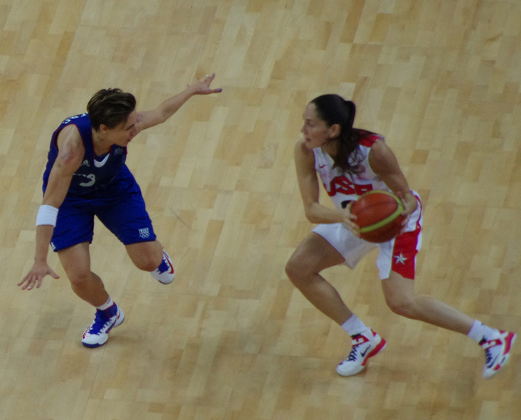 La basketteuse américaine Sue Bird (balle en main) face à la française Céline Dumerc lors de la finale olympique de Londres.